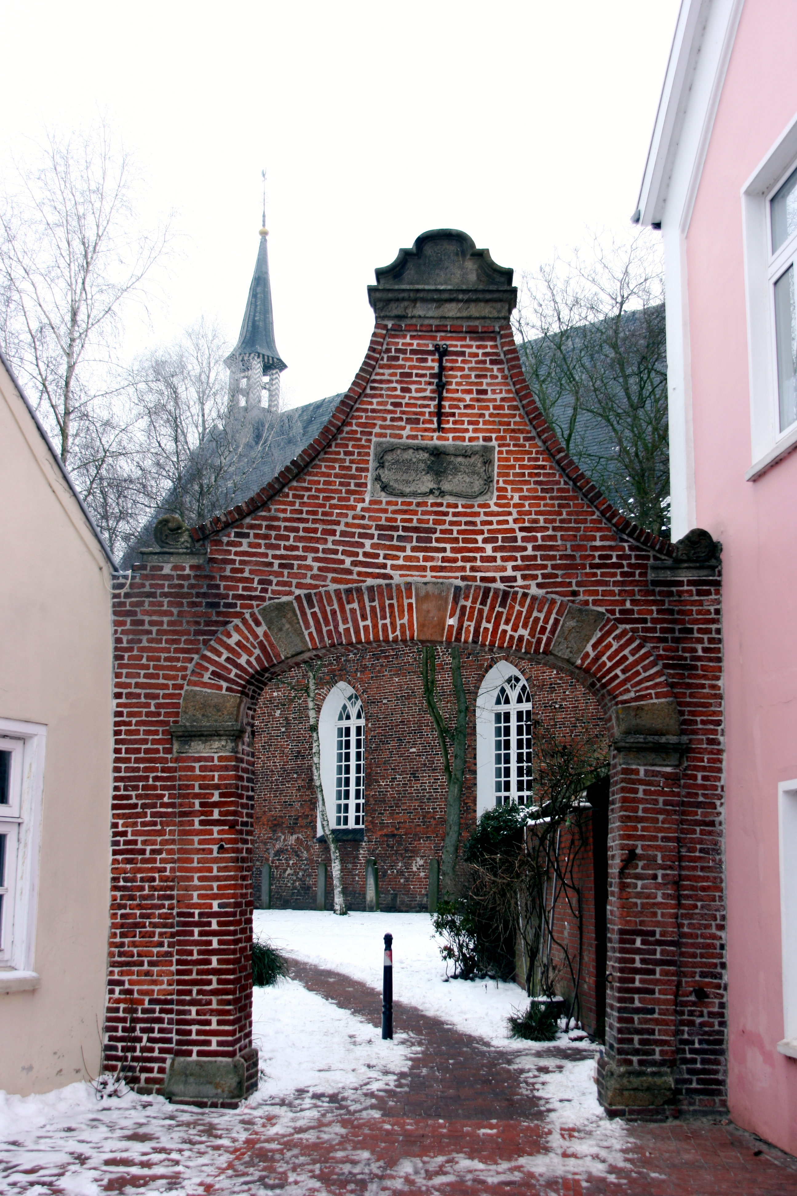 Kaakebogen in Weener